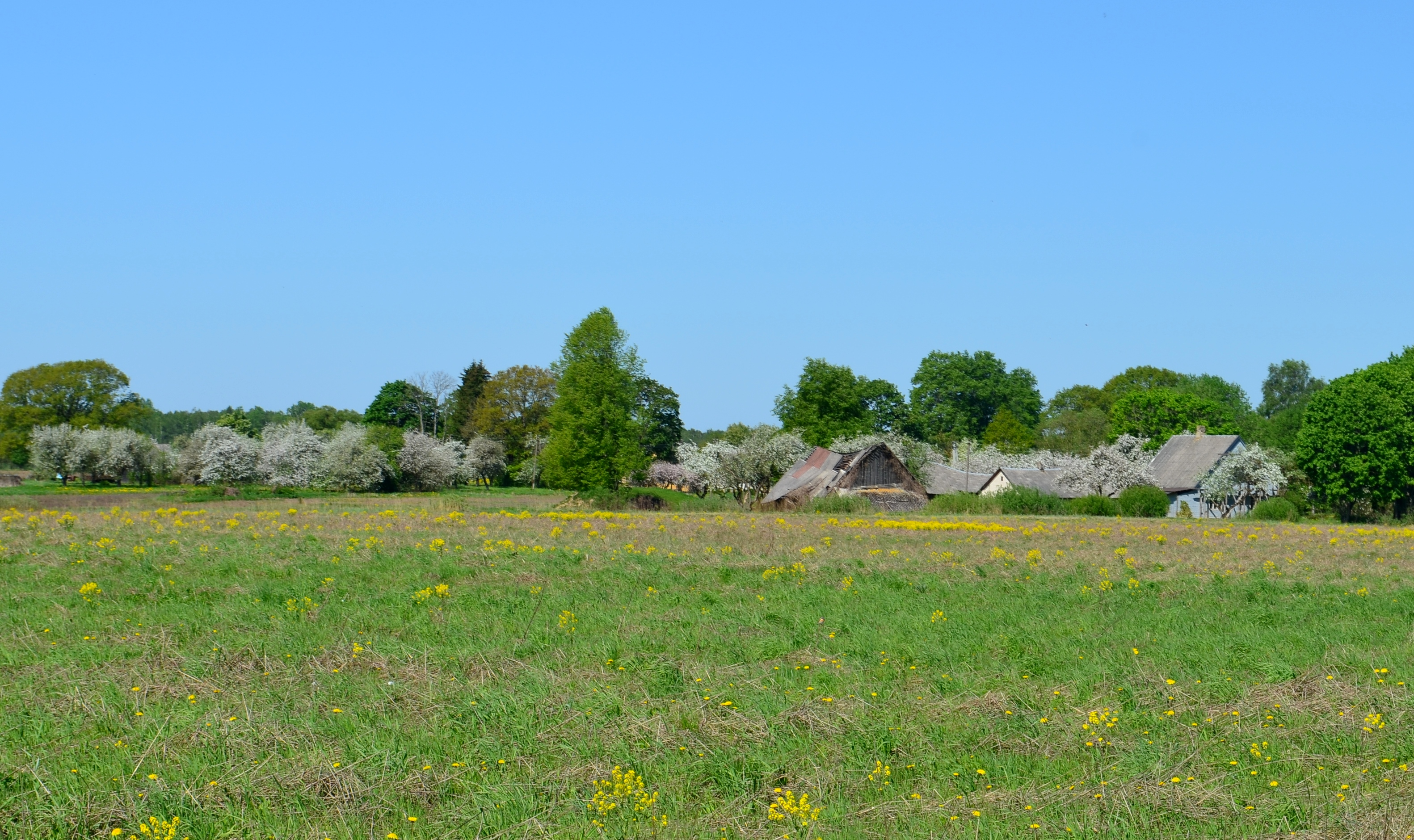 Jurgelionys, Taujėnų sen., Ukmergės raj.